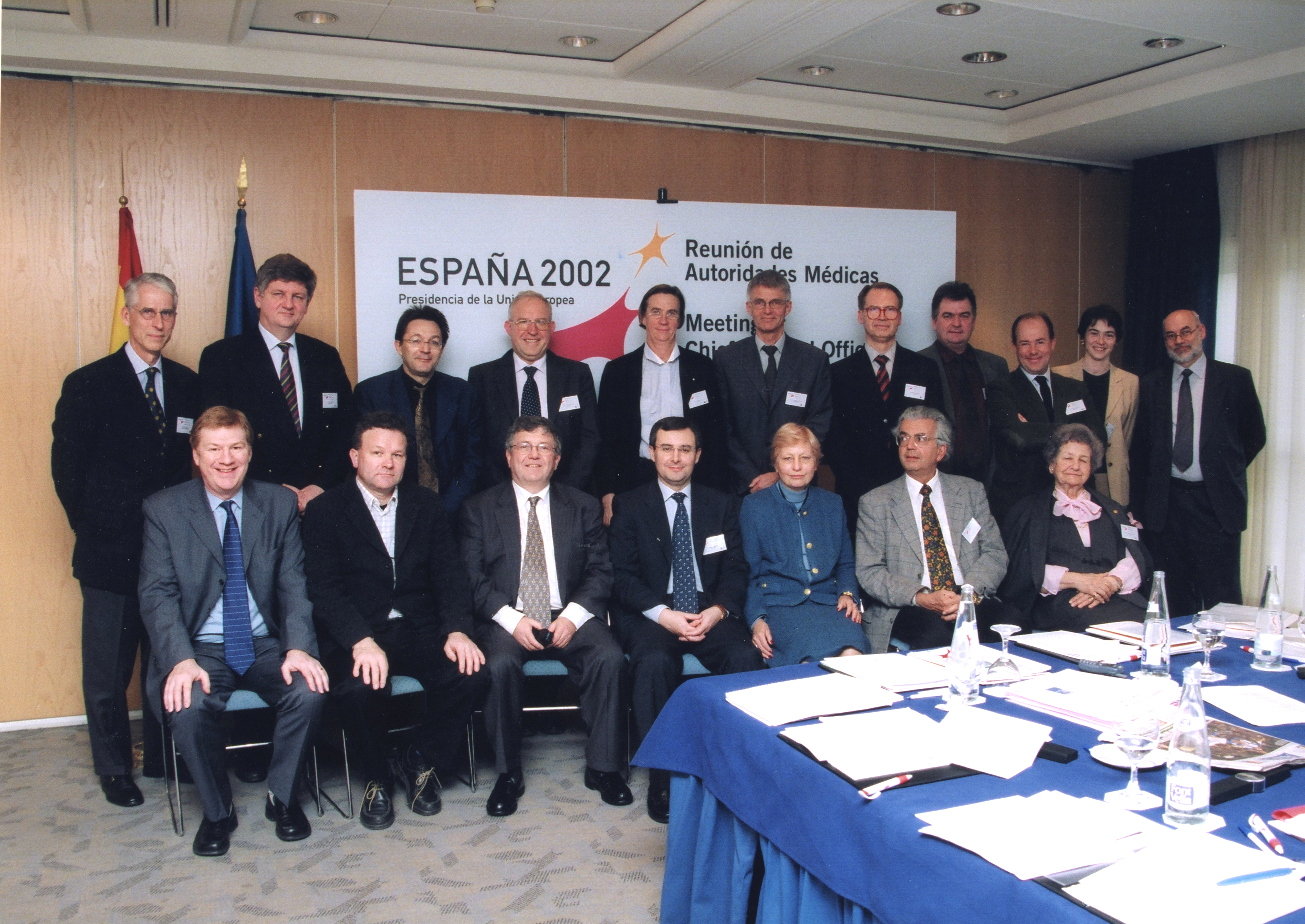 Reunión de Chief Medical Officers de la UE en Valencia 8-03-2002